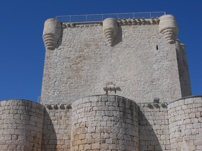 Castillo gótico del siglo XV - XVI.